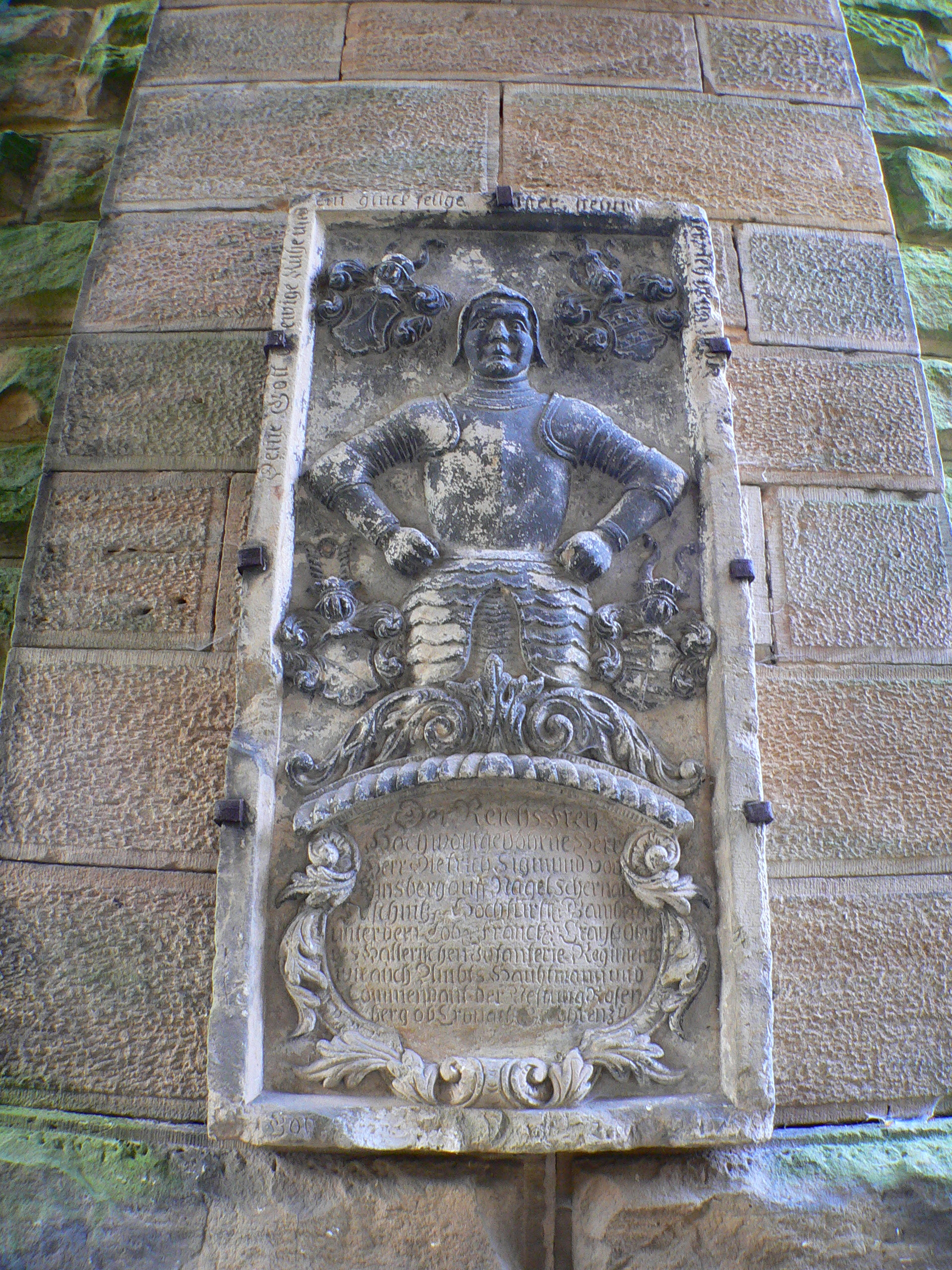 Schloss in Küps-Oberlangenstadt, Bayern, Regierungsbezirk Oberfranken, Landkreis Kronach - Epitaph